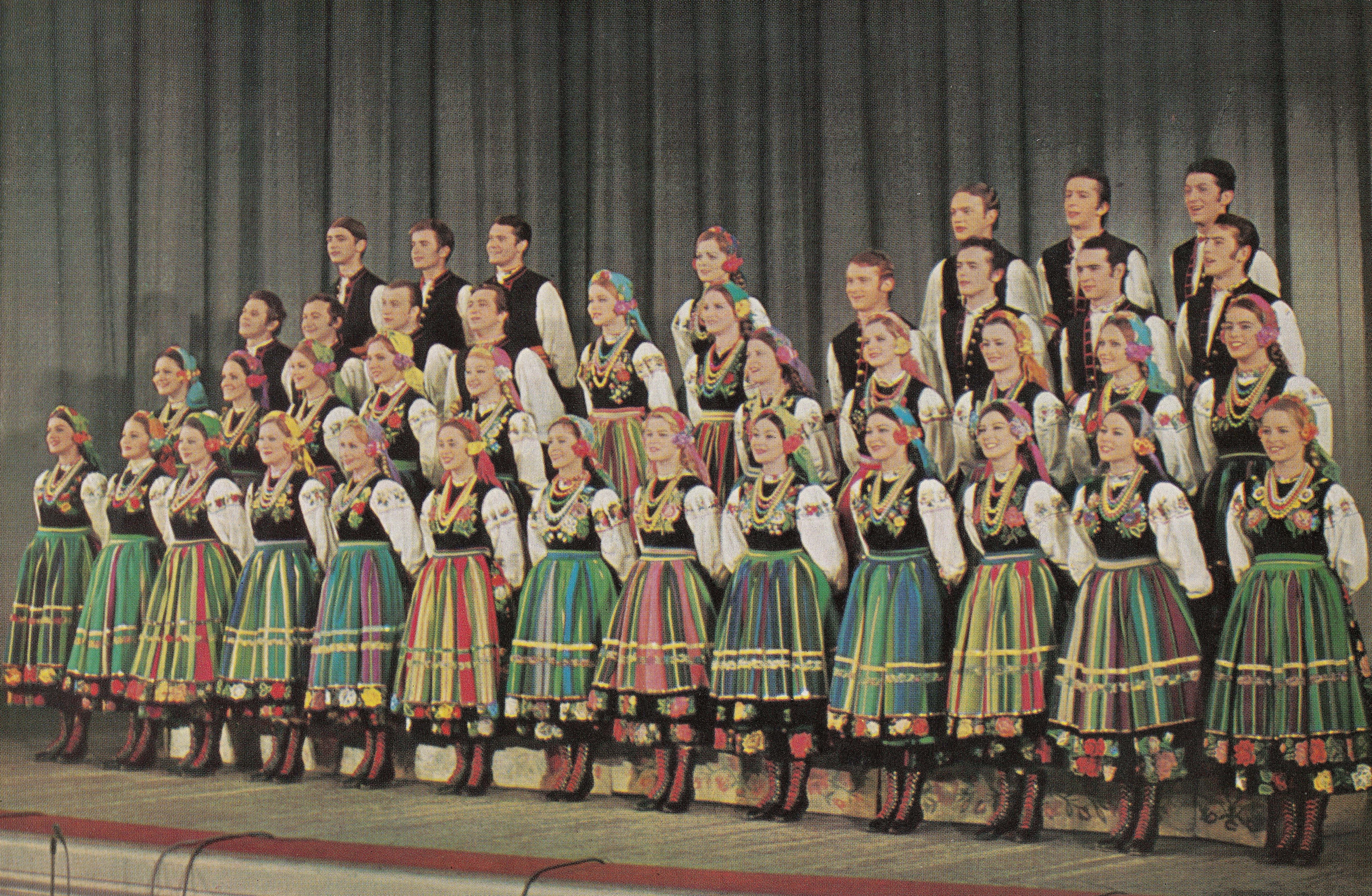 Państwowy Zespół Pieśni i Tańca "Mazowsze"